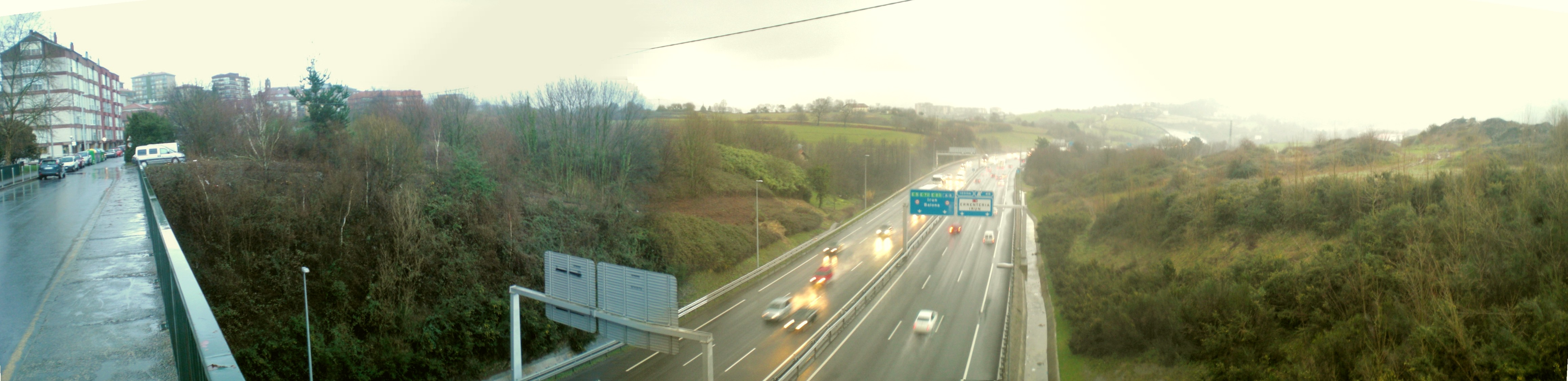 Larratxo, Auditz-Akular, autobia eta Lau Haizetako parkea.